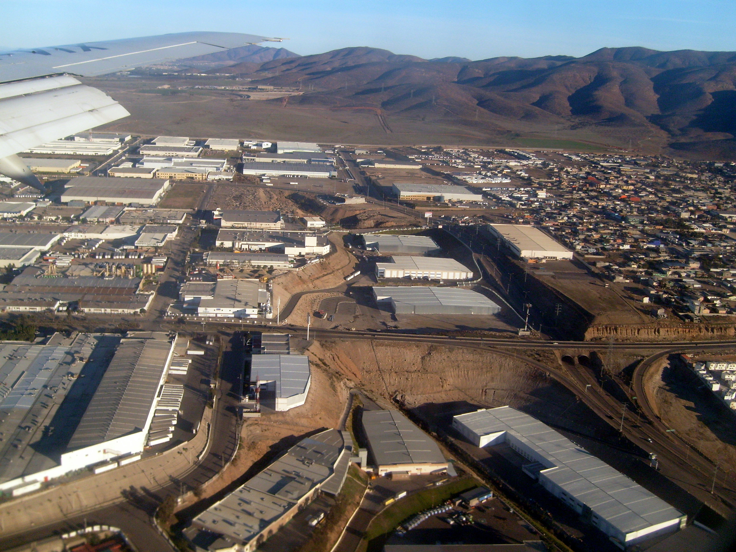 Industrial park in Tijuana